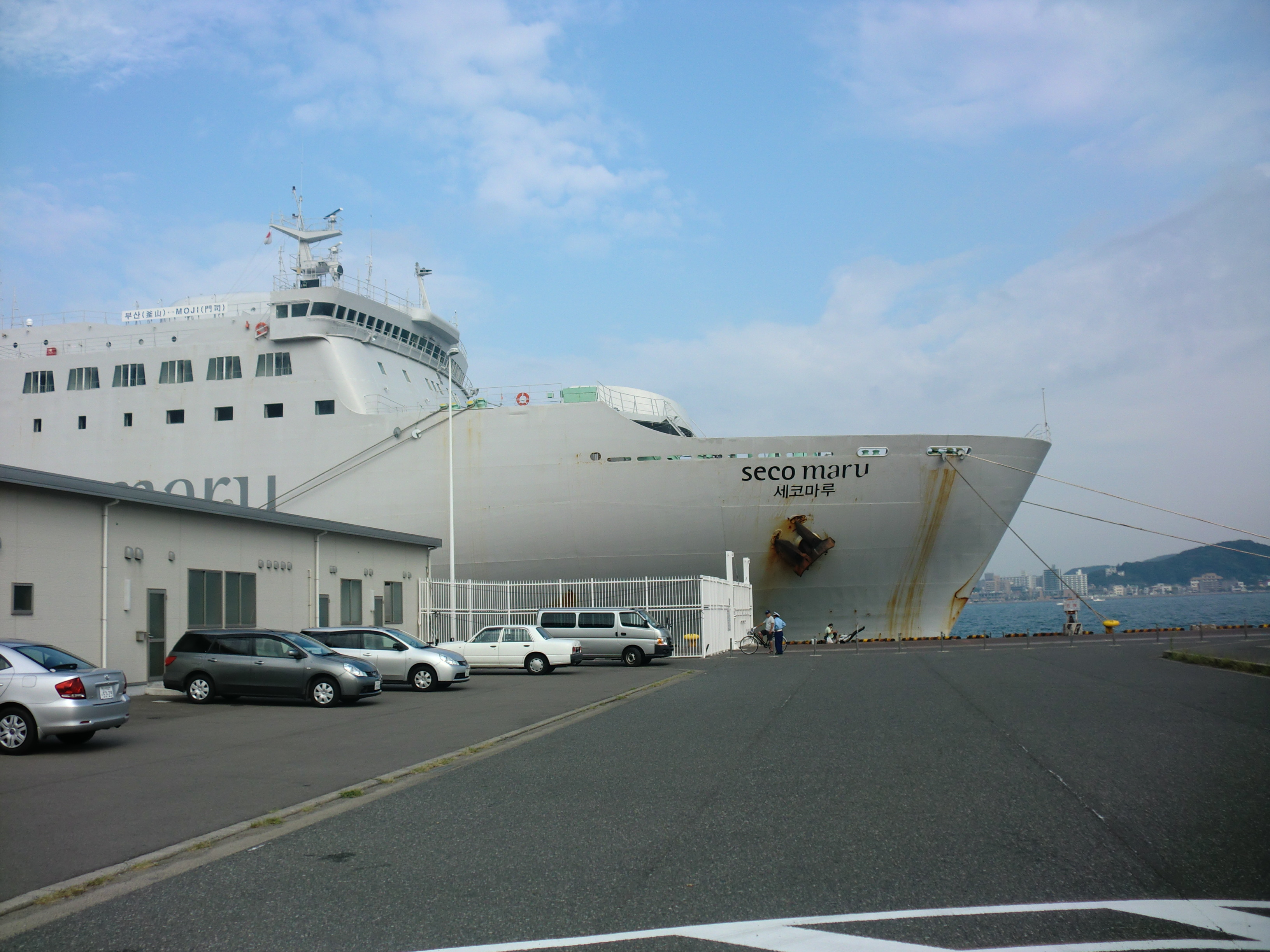 세코마루 와관 (모지항)